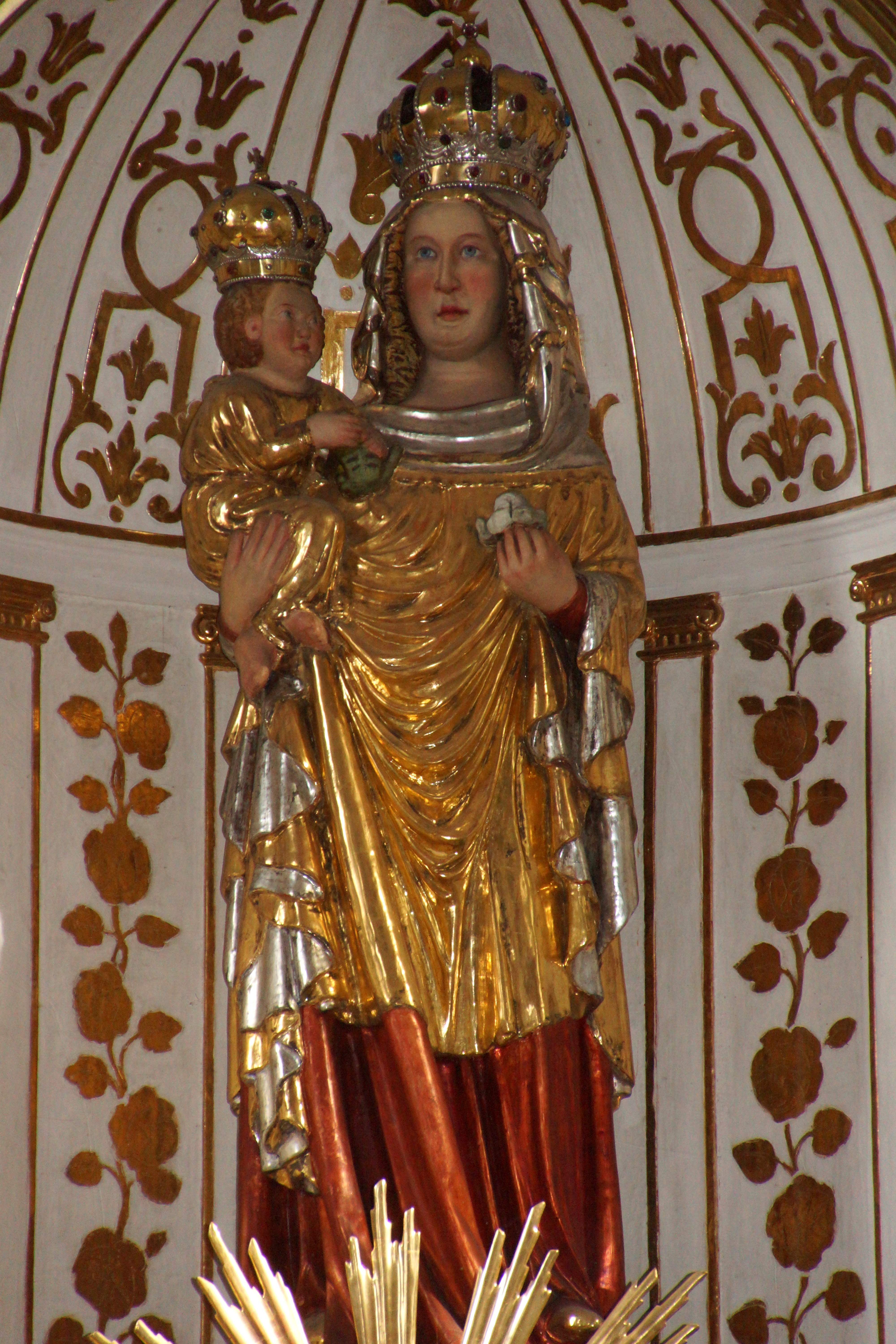 Die Wallfahrtskirche Mariä Himmelfahrt in Mariaort bei Regensburg